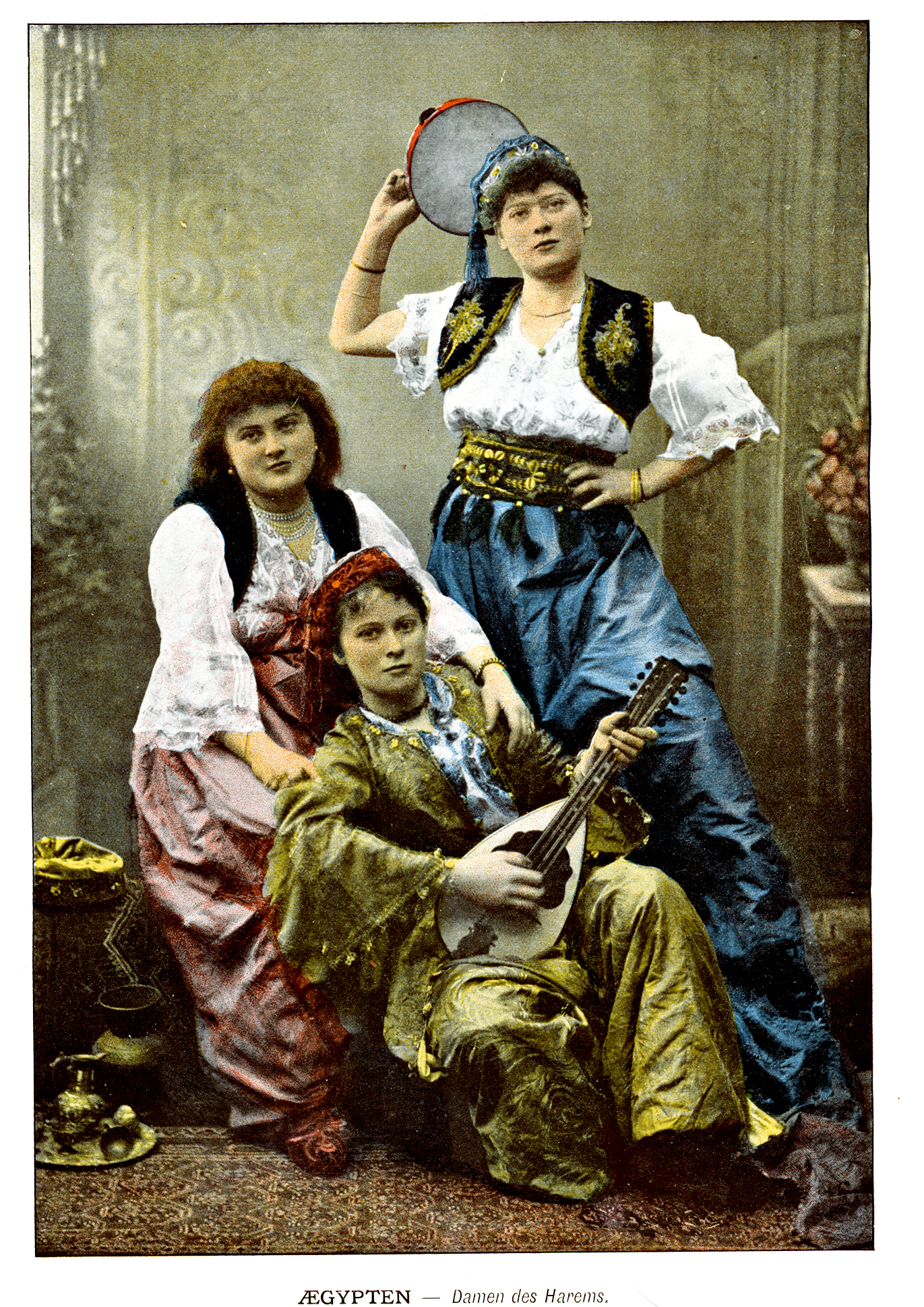 Harem en Egypte